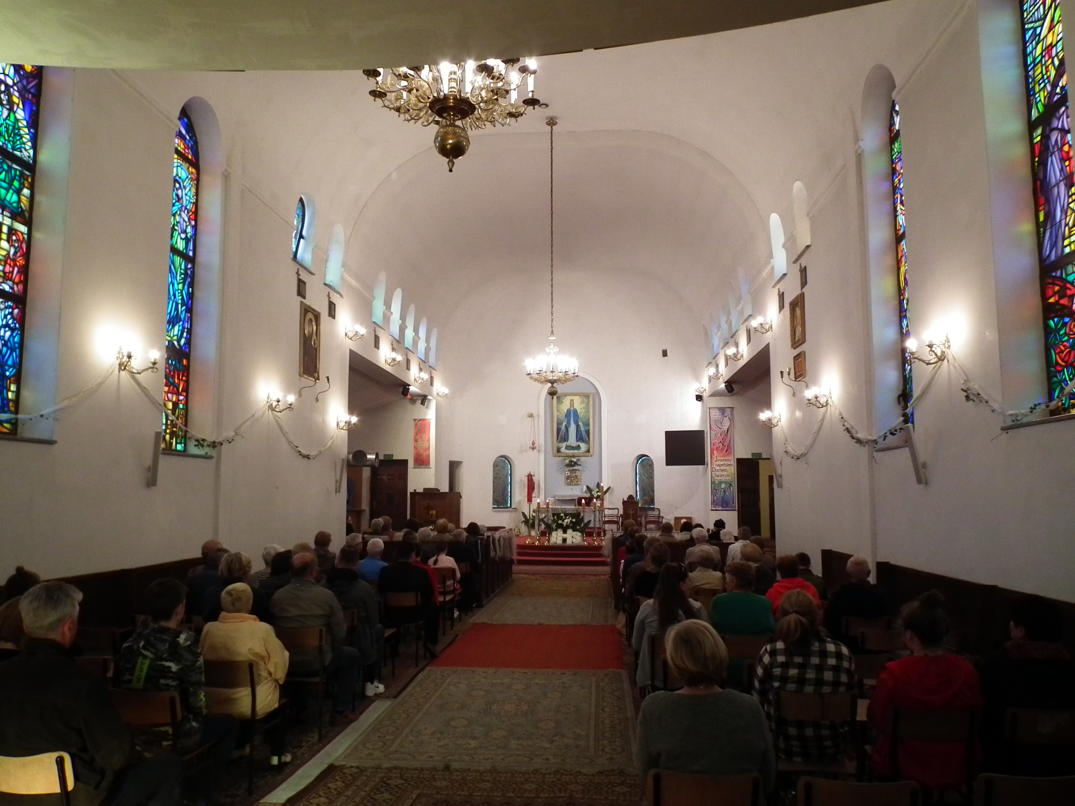 Kościół w Grotnikach Łódzkich.